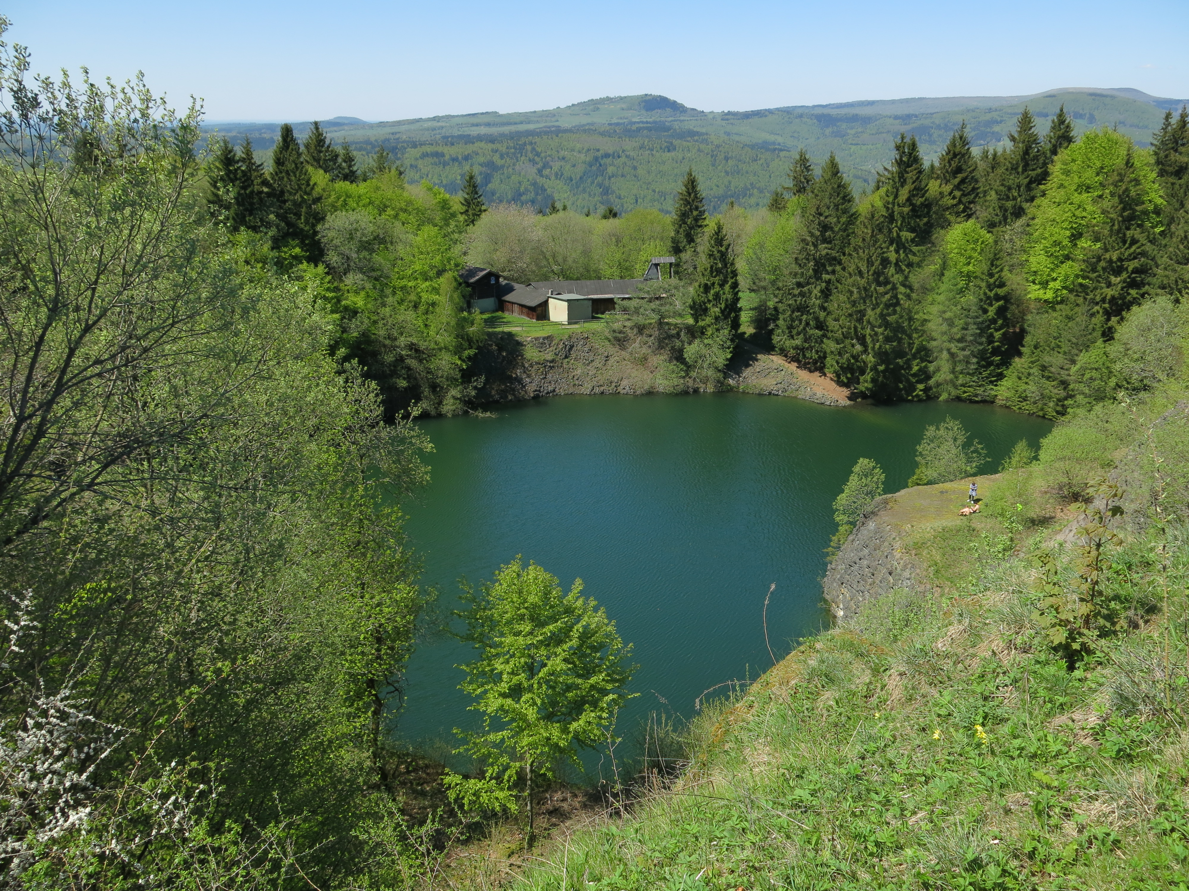 Der Basaltsee "Tintenfass" am Farnsberg bei Riedenberg in der Rhön. Geotop Nr. 672A014 im Geotopkataster Bayern.